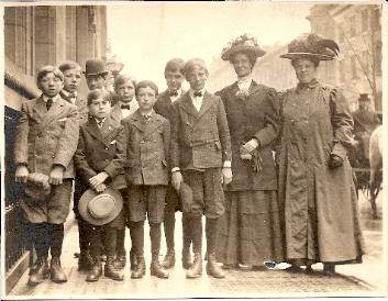 Photographie des Orphelins avant la montér dans le train (XIXème siècle)